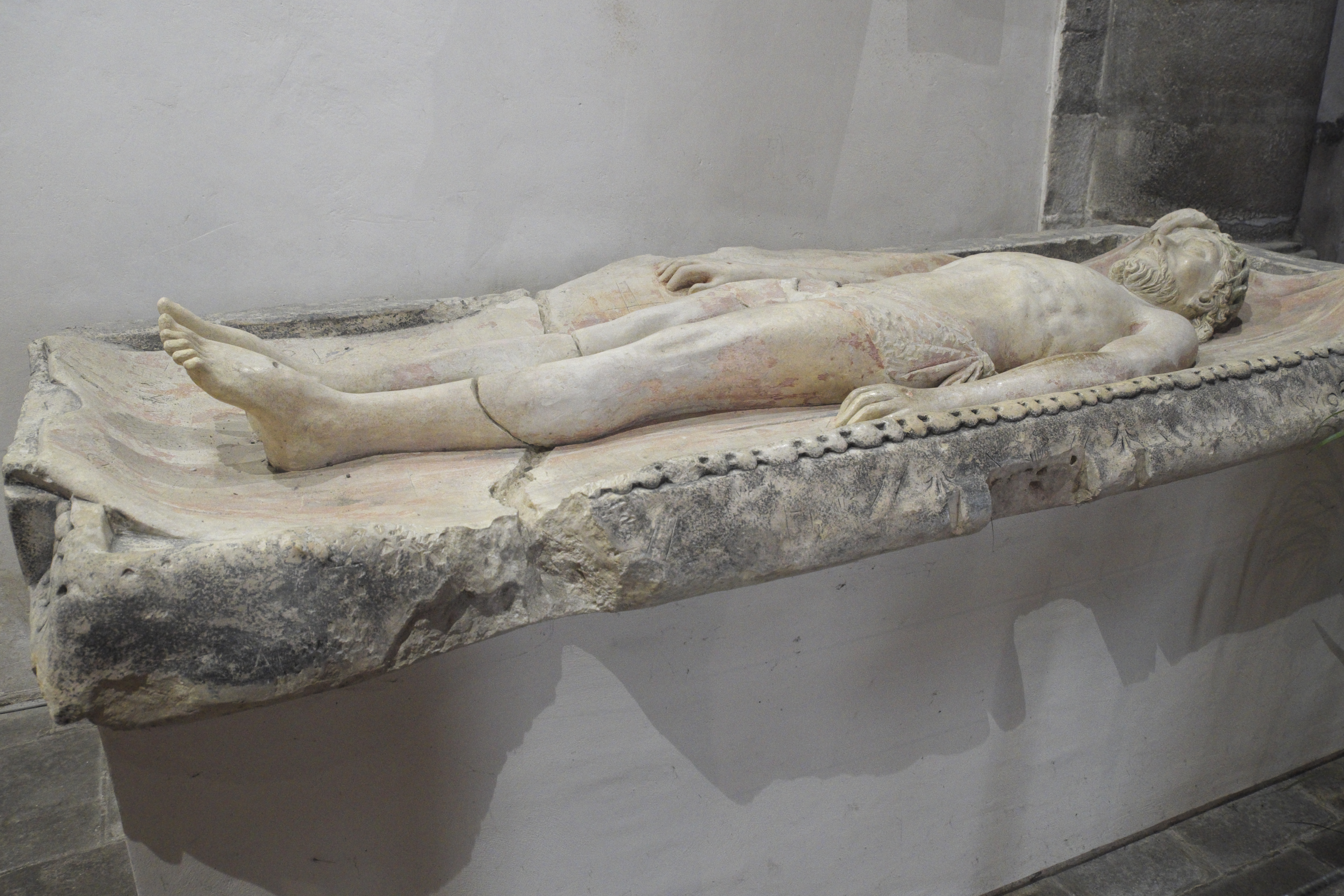 Katholische Pfarrkirche Saint-Gildas in Auray im Département Morbihan (Region Bretagne/Frankreich), Liegefigur Christus im Grab, ursprünglich Teil einer Grablegungsgruppe aus der ersten Hälfte des 16. Jahrhunderts